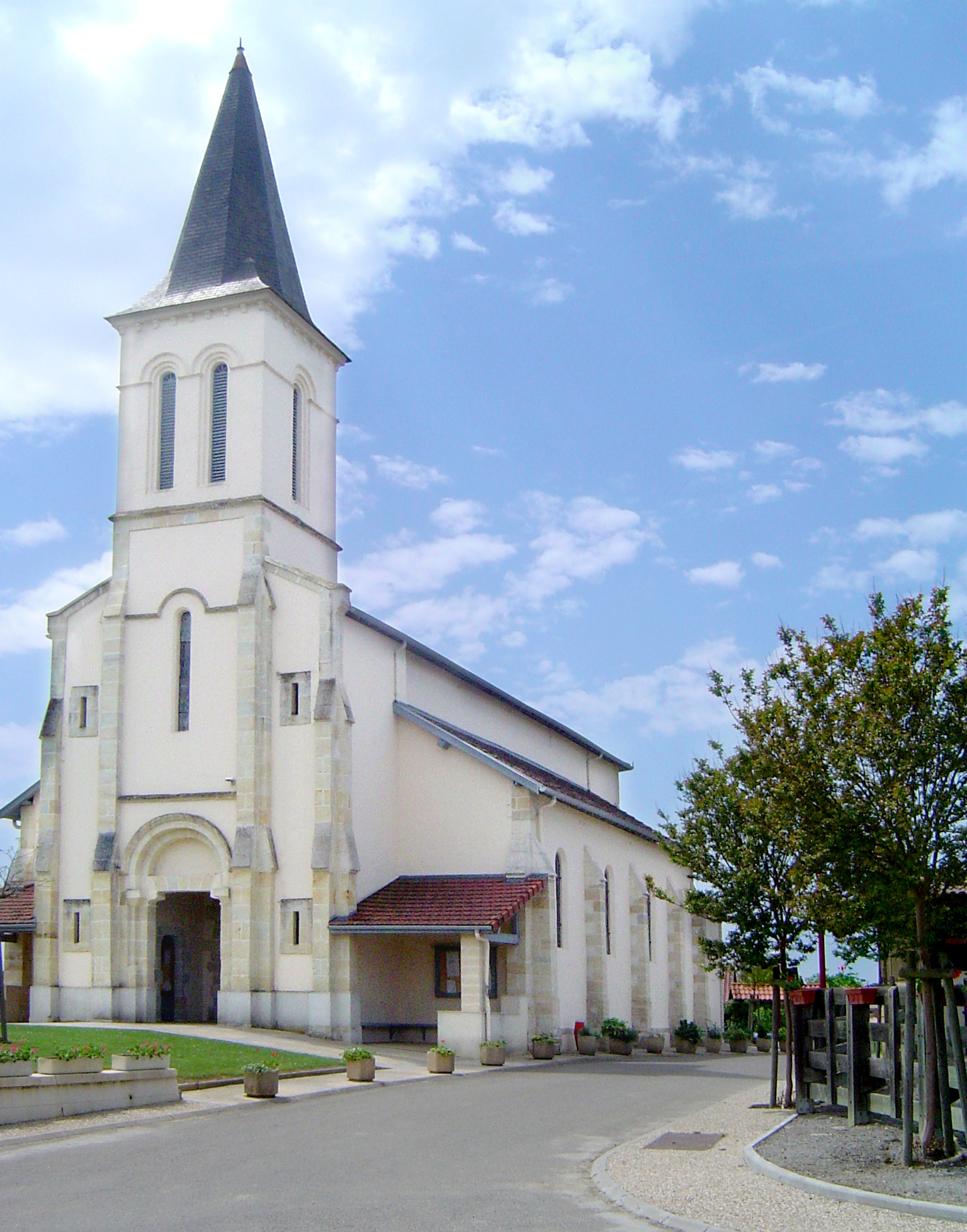 Glèisa de Sent Bertomiu de Sèrraslos ; Sèrraslos e Arribans ; Gasconha